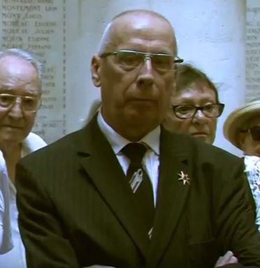 Jaume Motet a la commemoracion de la Copa Santa, Avinhon, julhet de 2017